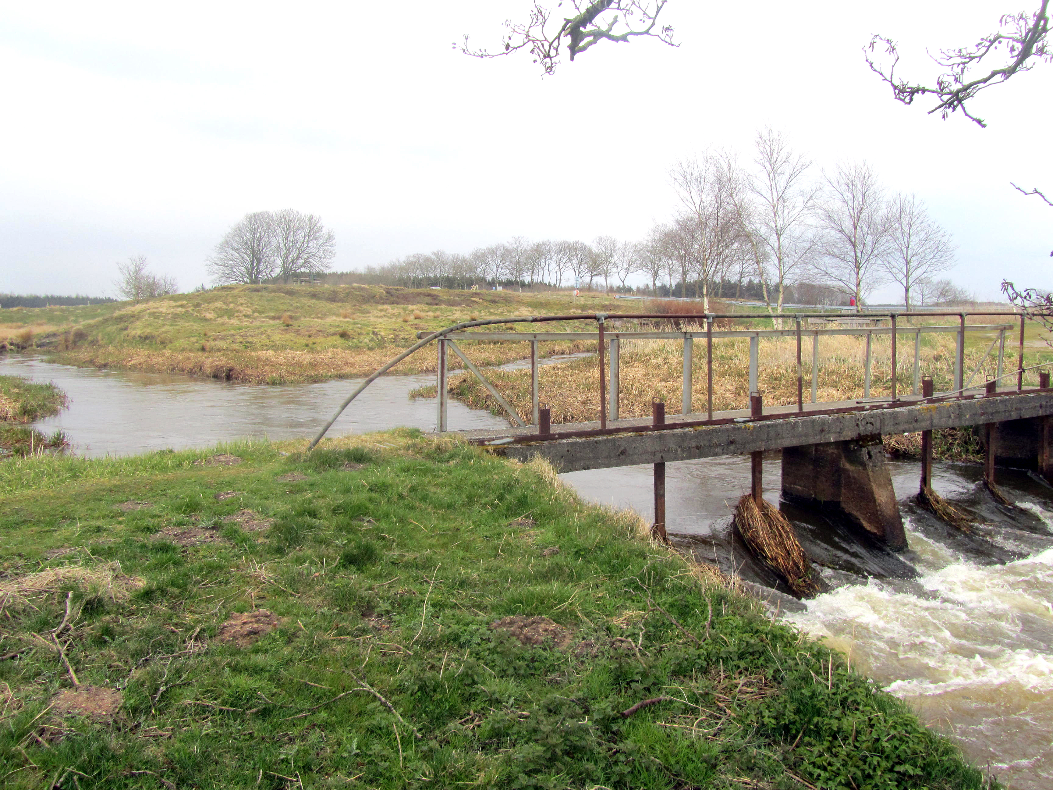 Rind Å og Skjern Ås sammenløb før stemmeværket, der regulerer Dalgaskanalen